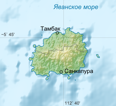 Физическая карта острова Баве́ан.